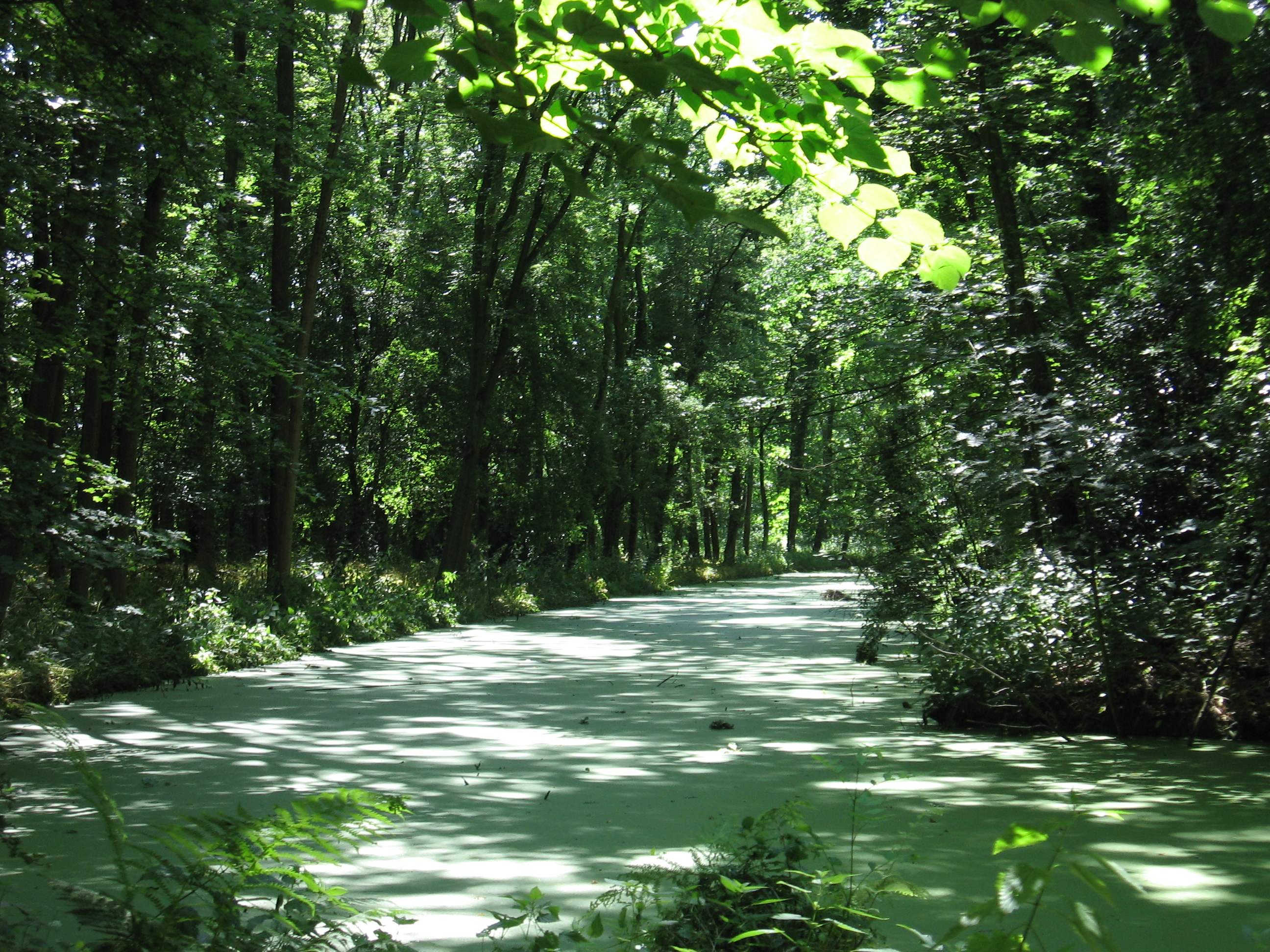 Cronesteyn